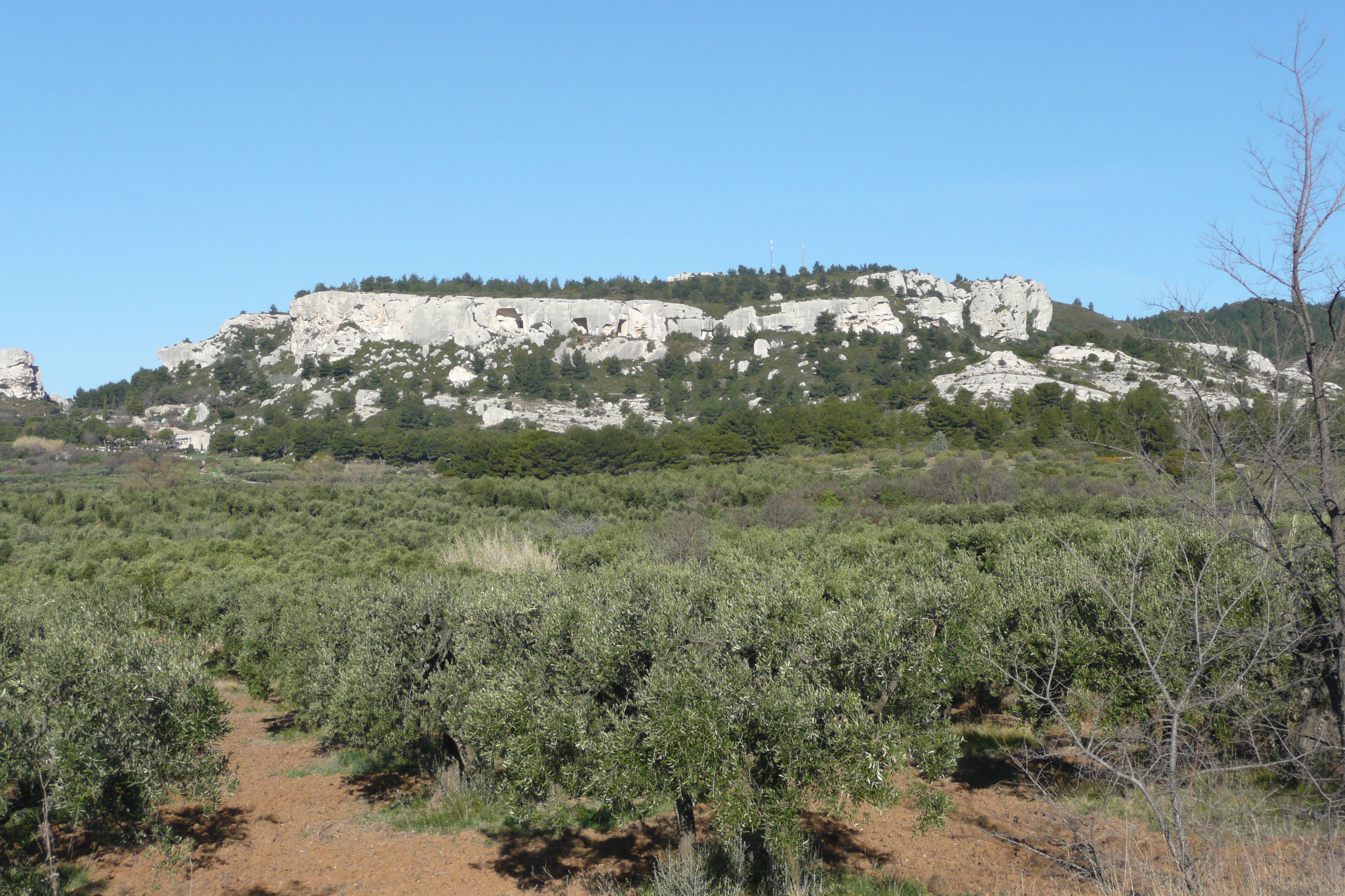 Les Alpilles près des Baux de Provence. Plateau des Bringasses.